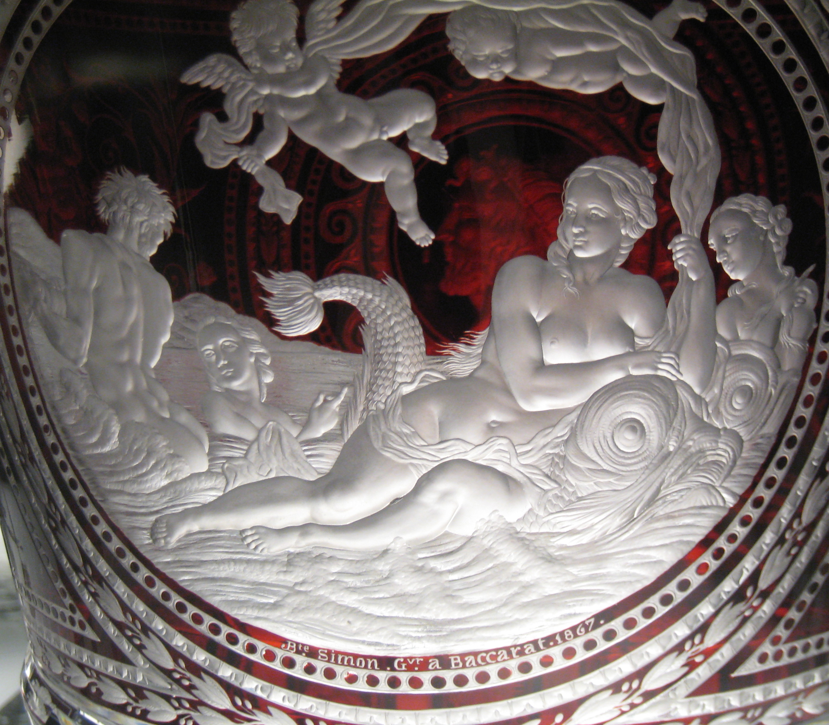 Objet en cristal, musée Baccarat, Paris, France